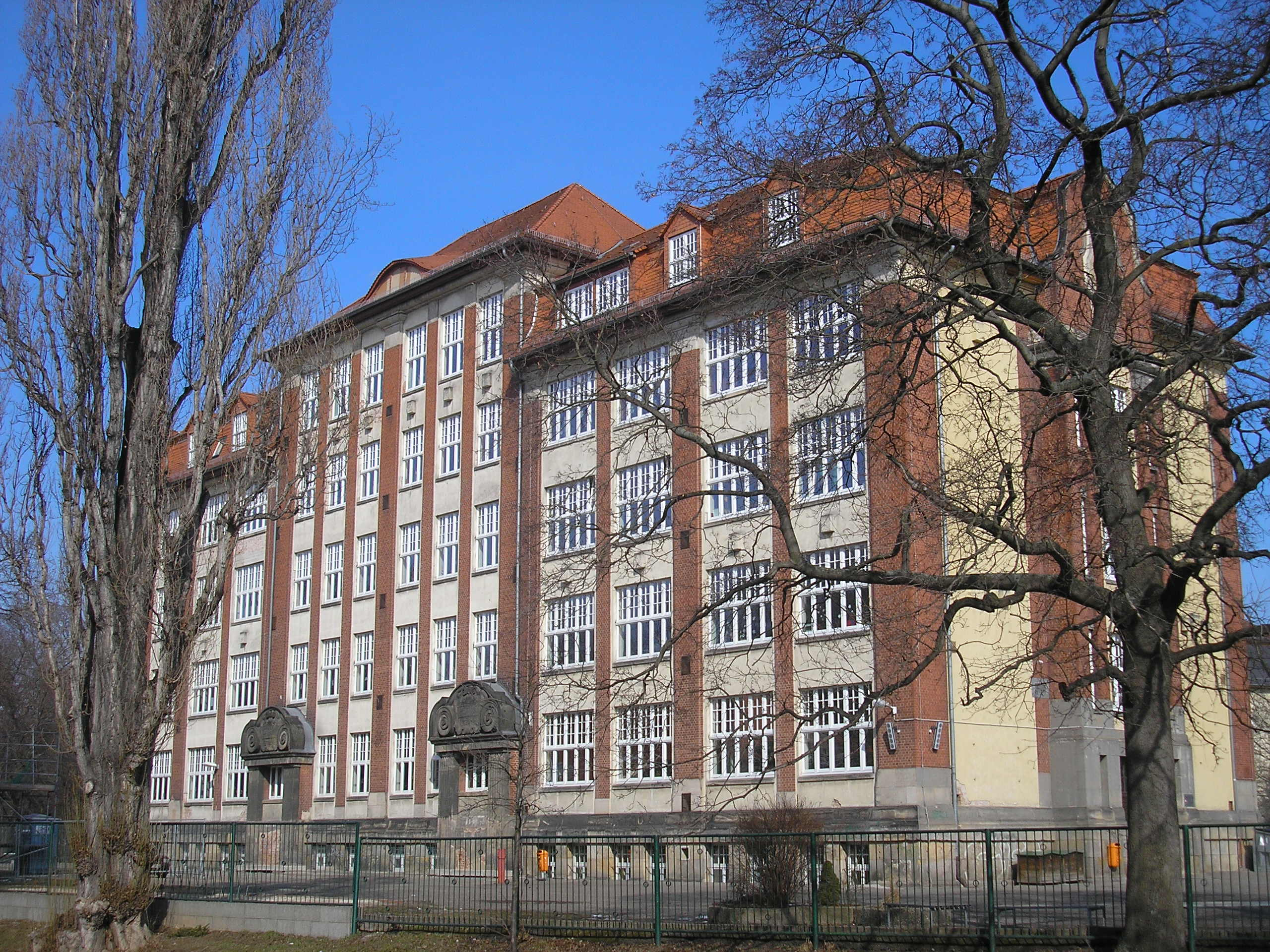 Die Lutherschule in Erfurt.